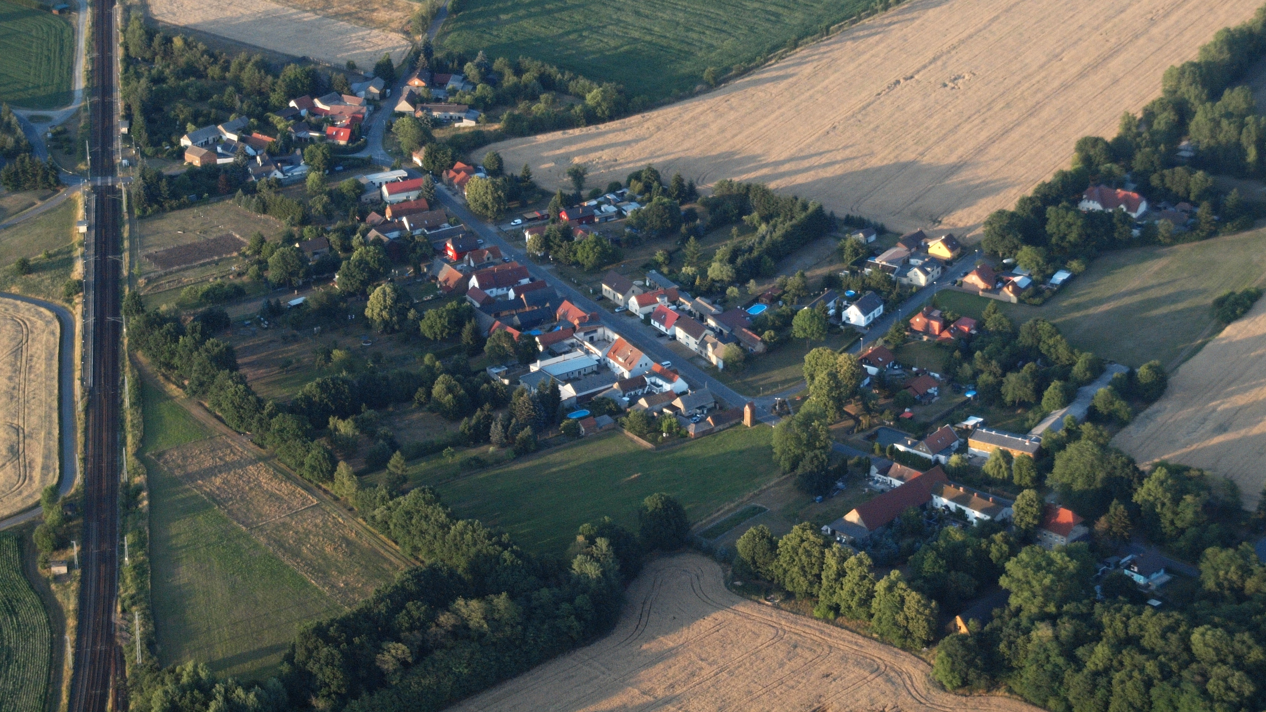 Bahnsdorf (Uebigau-Wahrenbrück), Luftaufnahme (2015)